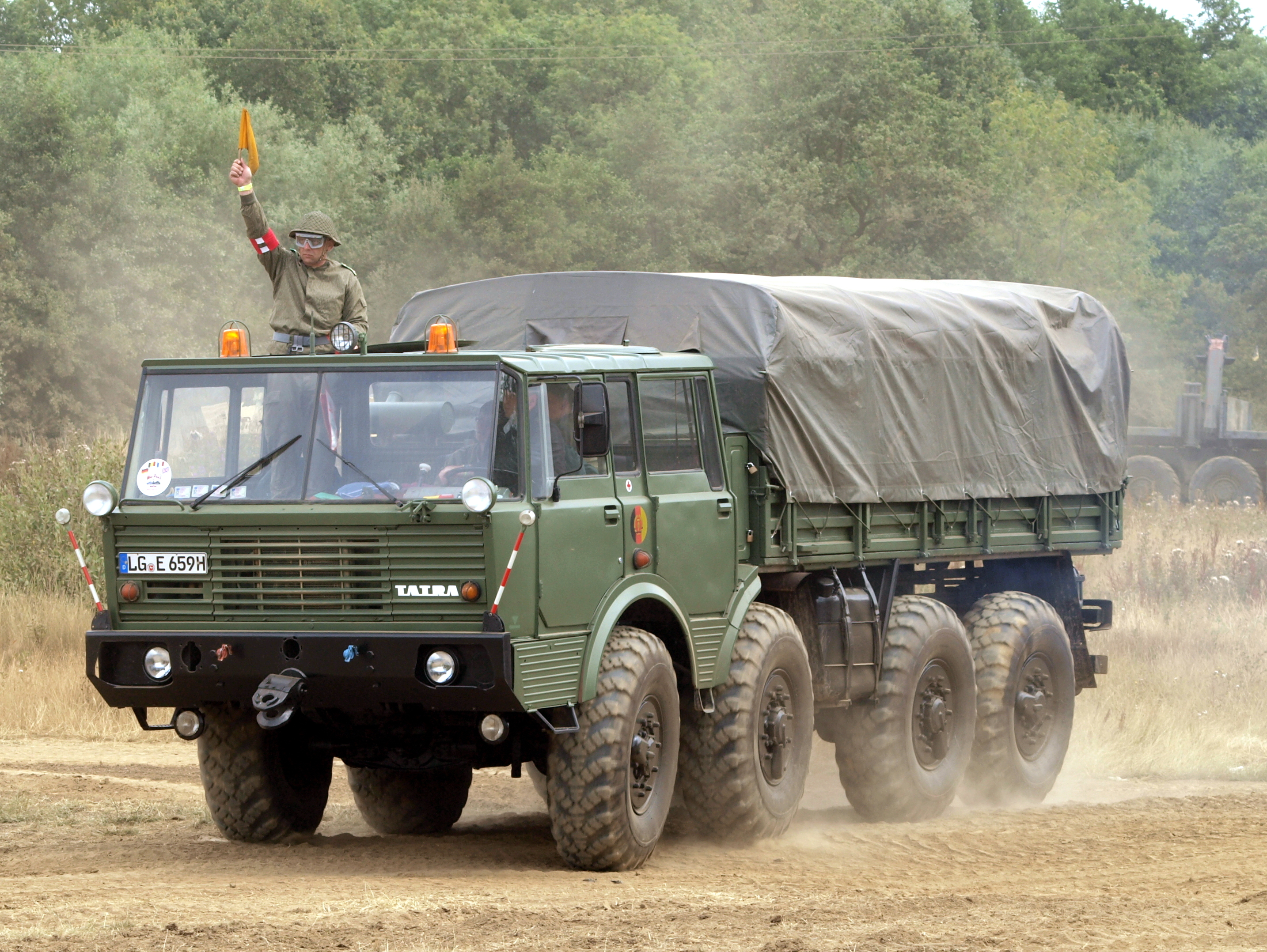 Tatra 813